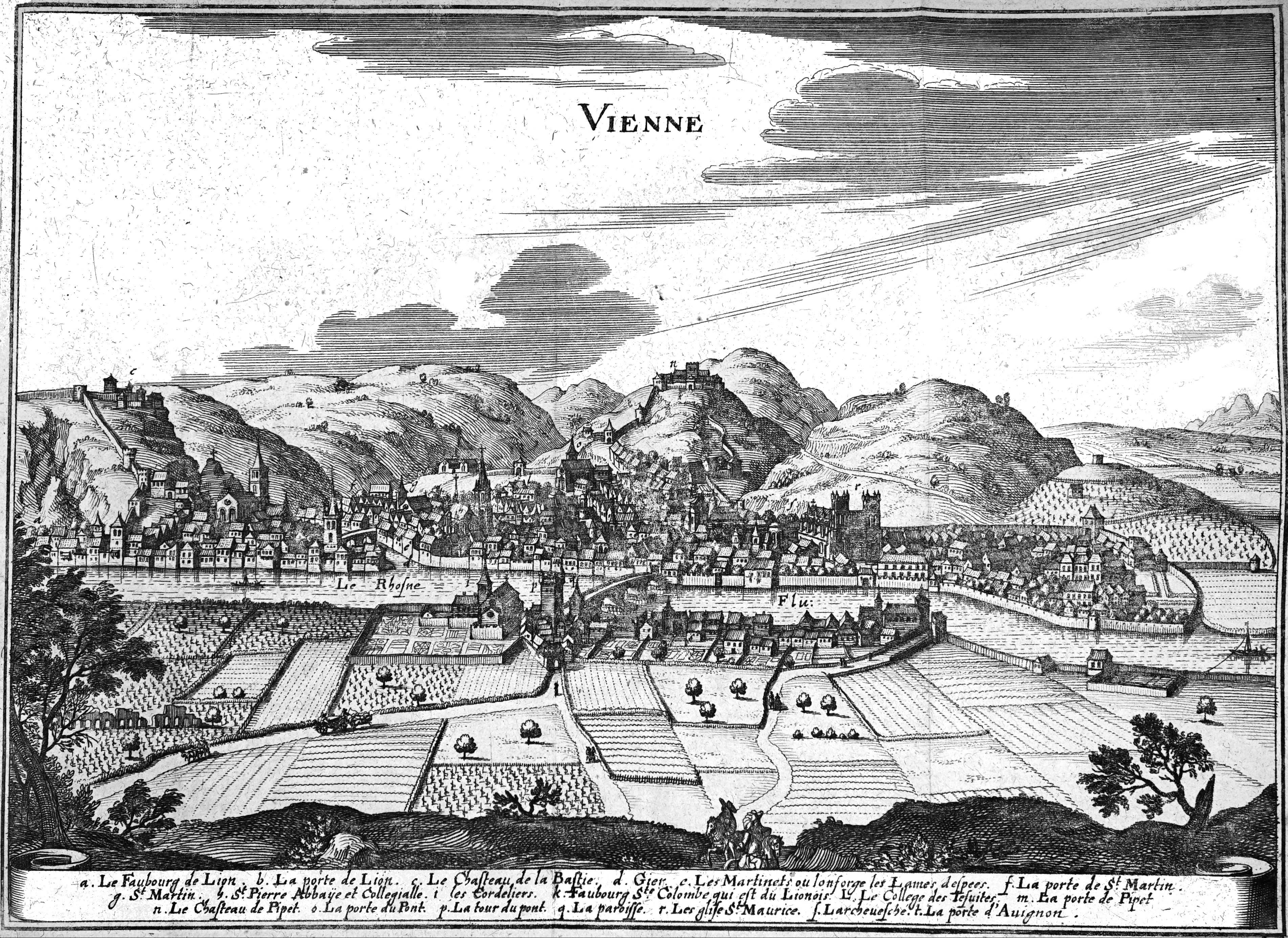 image provenant de Topographiae Galliae.